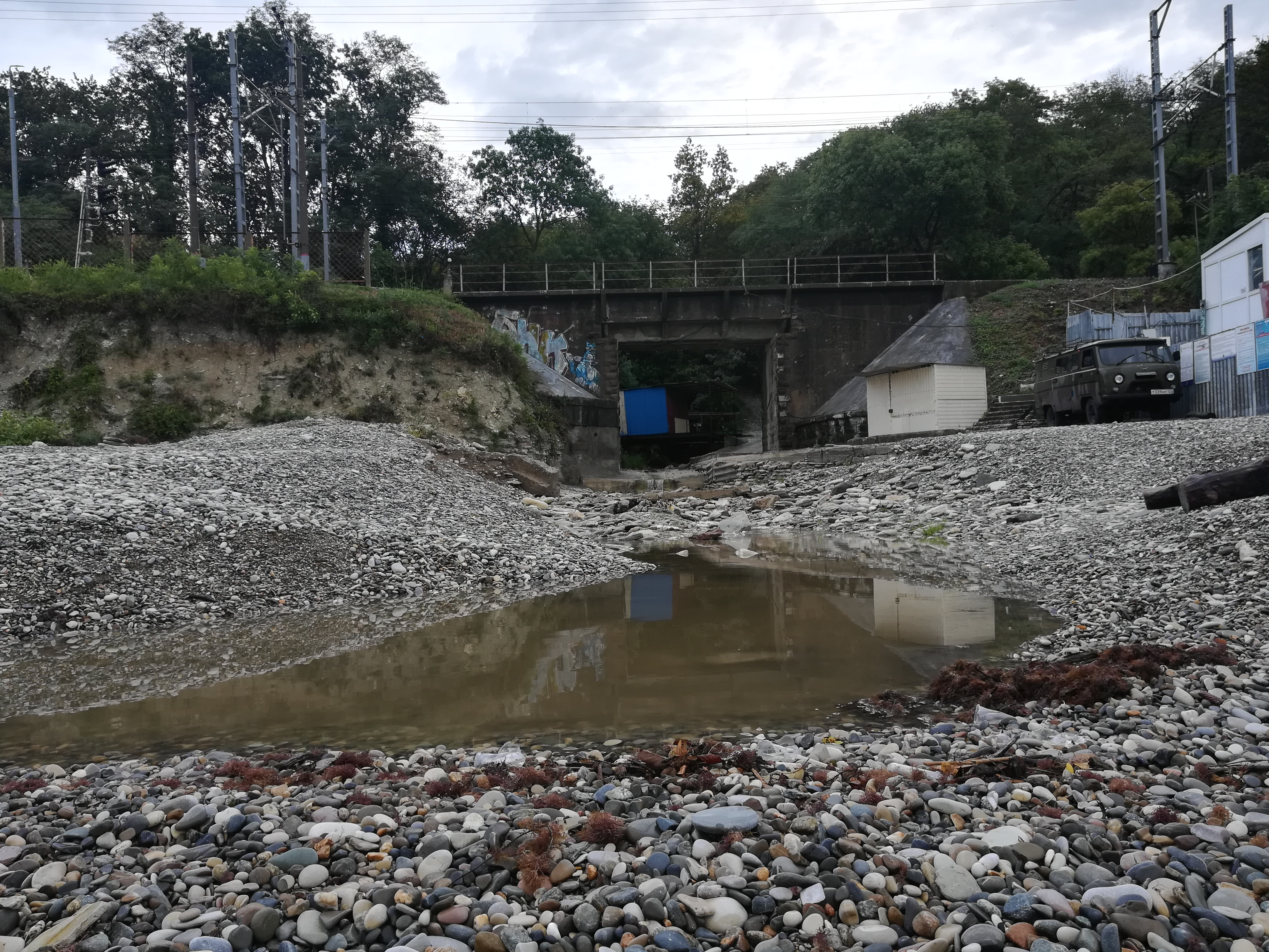 Вишневка